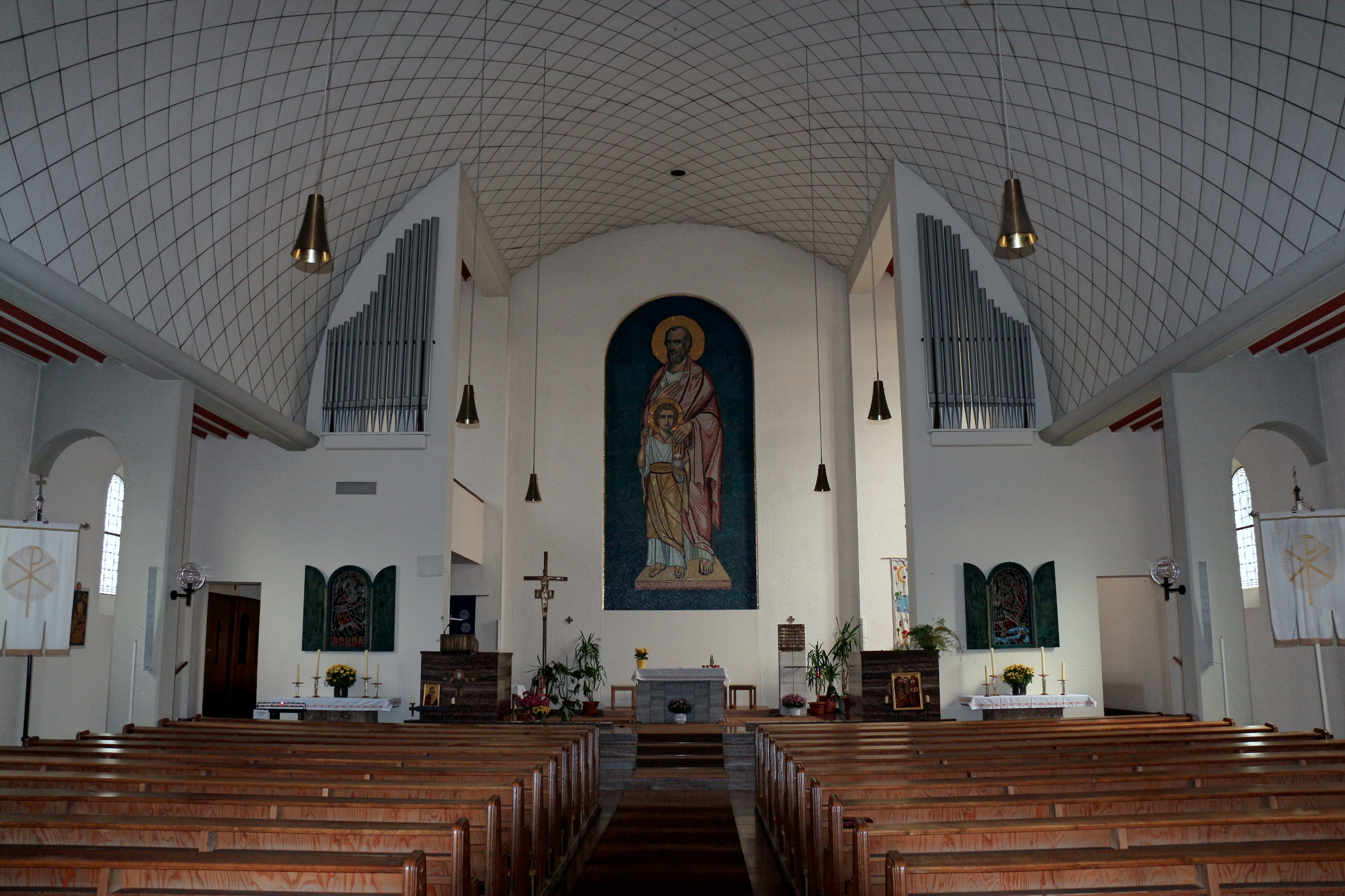 Pfarrkirche St. Josef, Bürmoos, Bezirk Salzburg-Umgebung, Land Salzburg; geweiht 12. August 1956